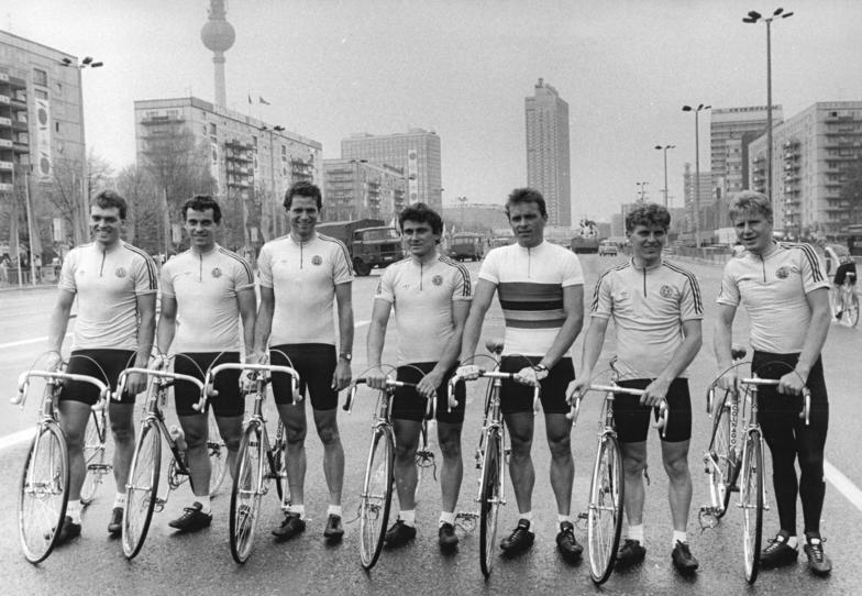 Friedensfahrt, Berlin, Mannschaft der DDR ADN-ZB Oberst 1.5.87 Berlin: DDR-Friedensfahrtmannschaft 87-V.l.: Olaf Ludwig, SG Wismut Gera, Uwe Raab, SC DRfK Leipzig, Mario Kummer, SC Turbine Erfurt, Kapitän Thomas Barth, SG Wismut Gera, Uwe Ampler, amtierender Weltmeister, SC DRfK Leipzig, Jens Heppner, SG Wismut Gera, Jan Schur, Ersatzmann, SC DRfK Leipzig. Sperrfrist: 4.5.87, 4.00 Uhr